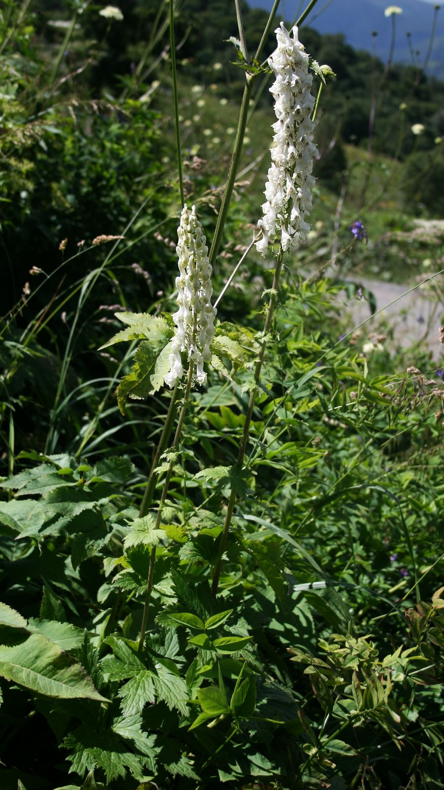 Aconitum orientale, Hahnenfußgewächse (Ranunculaceae) – Georgien/საქართველო: Kleiner Kaukasus, an der Straße zum Tskhratskaro-Pass, ca. 4,9 km SSW Bakuriani/ბაკურიანი, ca. 2070 m s.m.